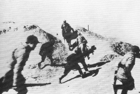 中文（中国大陆）: 攻击中的新四军第四师指战员